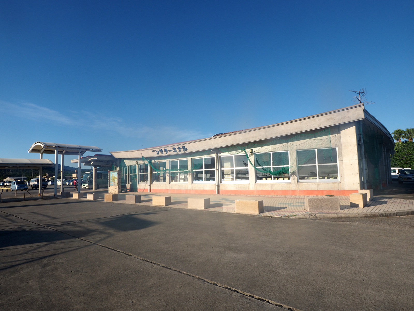 上原港デンサターミナル（沖縄県八重山郡竹富町西表島）